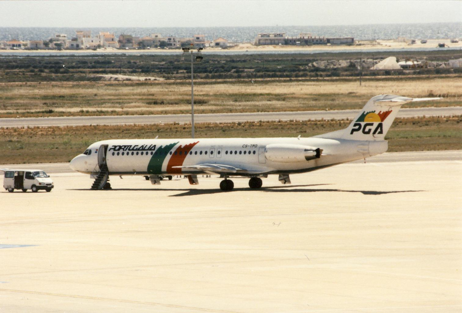 Fokker 100 der Portugalia Airlines(CS-TPD)